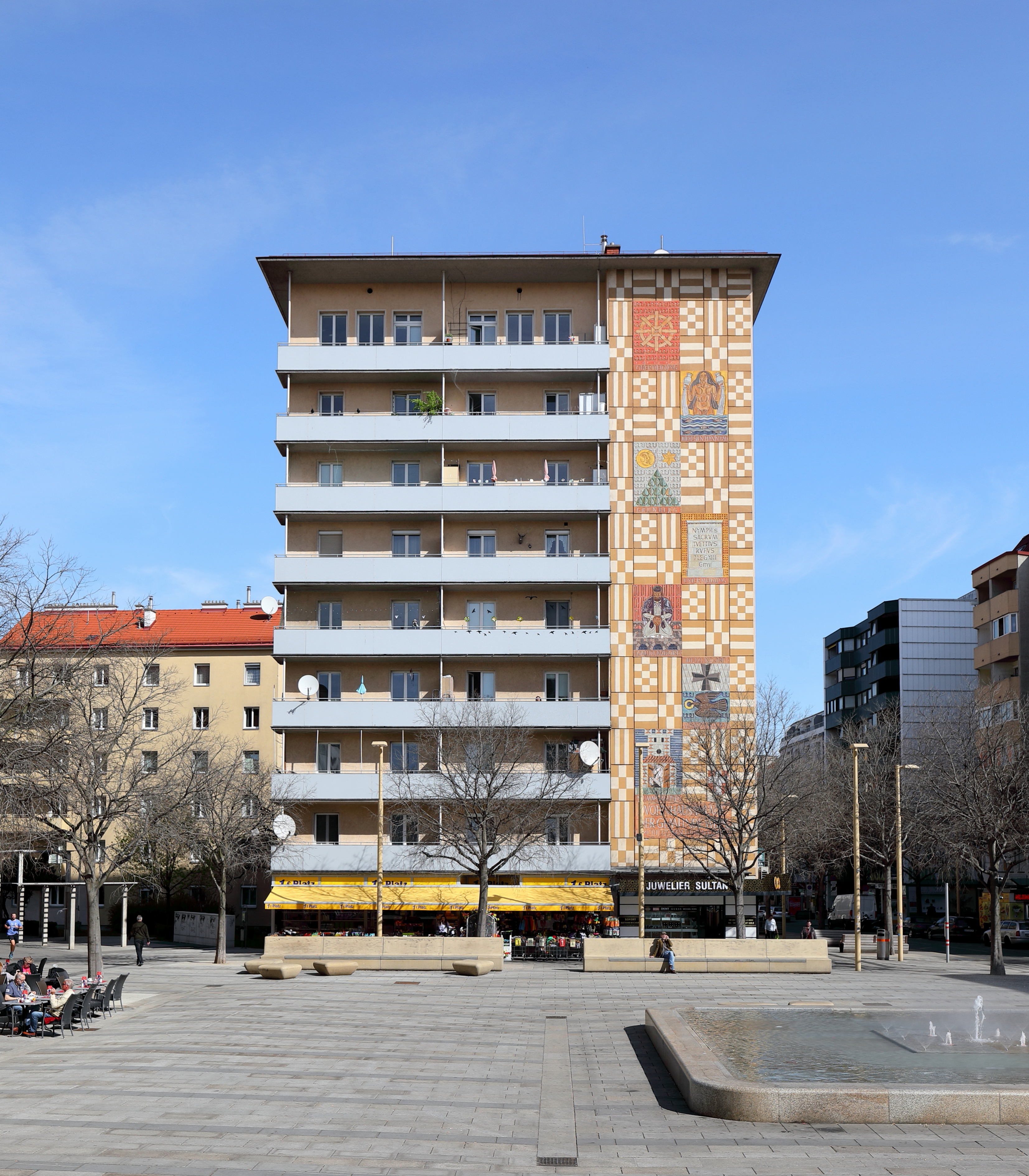 Das sogenannte „Wappenhaus“ am Meidlinger Platzl im 12. Wiener Gemeindebezirk Meidling. Der neungeschossige Wohnturm gehört zur Gemeinde-Wohnhausanlage „August-Fürst-Hof“ und wurde von 1955 bis 1957 errichtet. Die Majoliken mit dem Thema „Entwicklung des Meidlinger Wappens“ an der Front des Hochhausturmes wurden von Leopold Schmid geschaffen und stellen die Wappen der Bezirksteile dar.